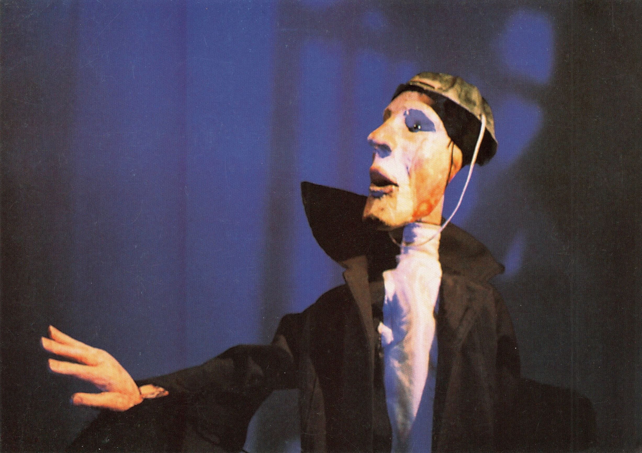 Raskolnikov "Forbrytelse og straff" 1995 Manus /scenografi/figurmaker: Brit Steinsvik Foto: Jenny -Marie Johnsen